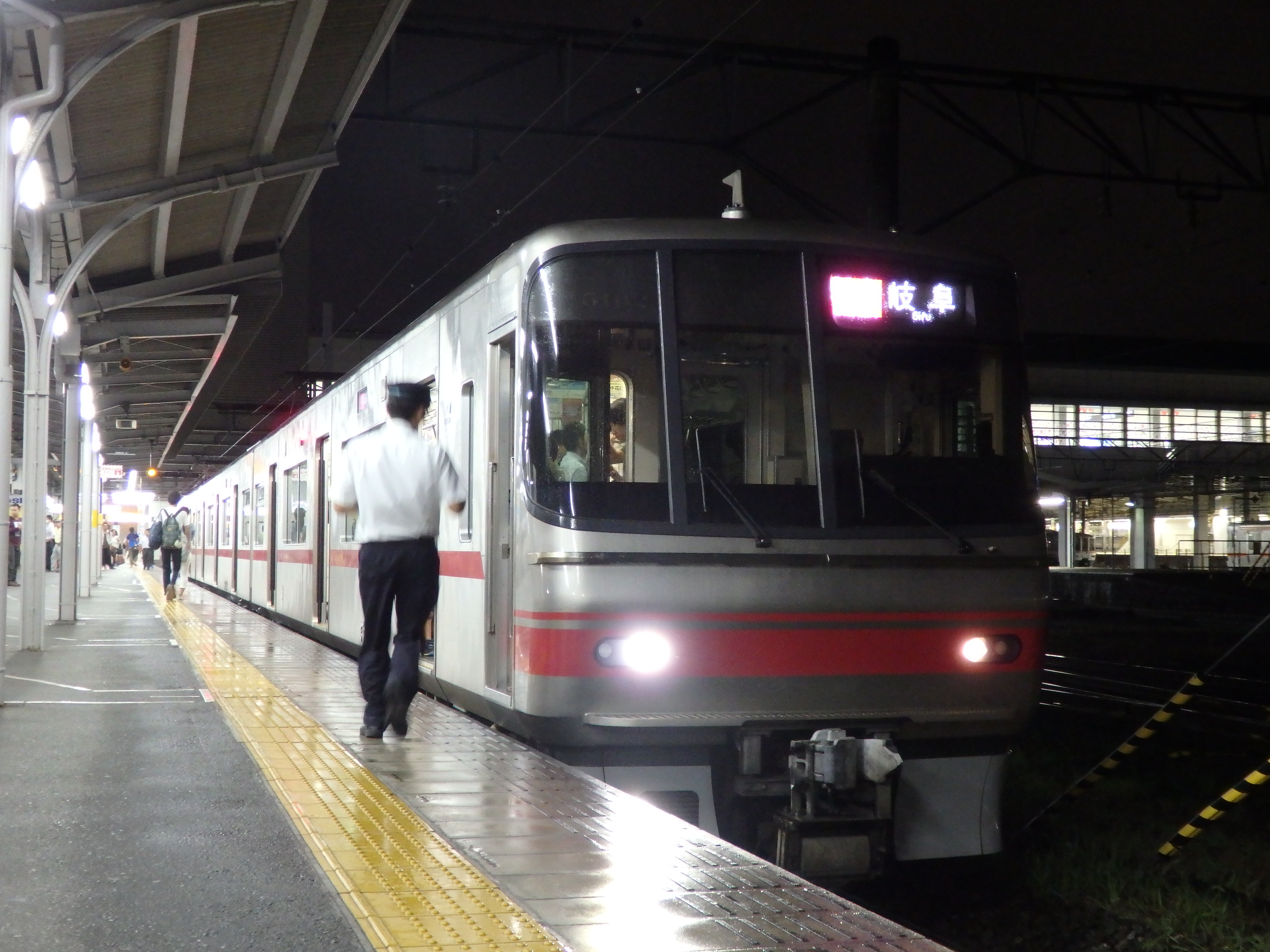 名古屋鉄道5000系 豊橋駅にて